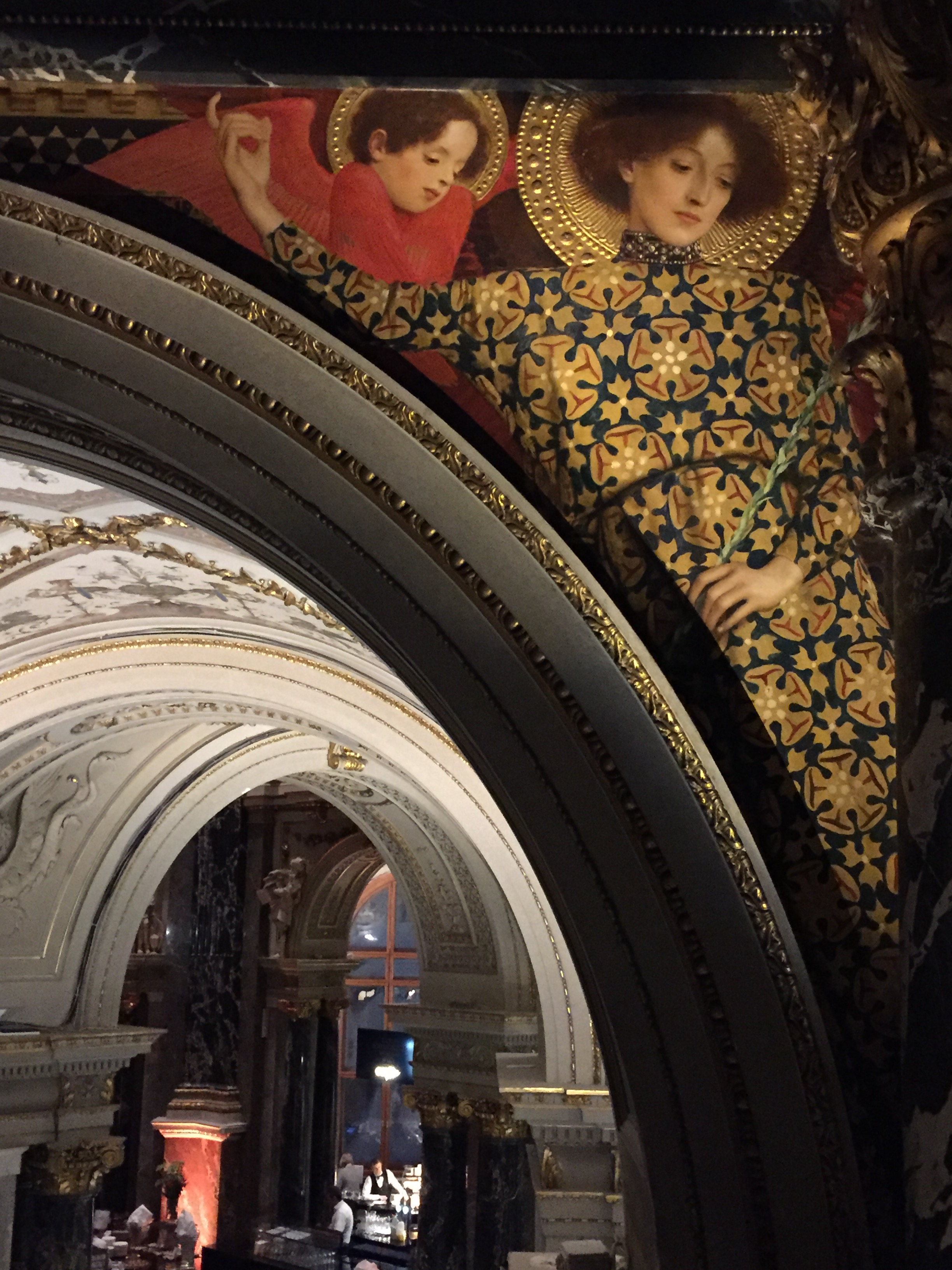 Zwickelbild